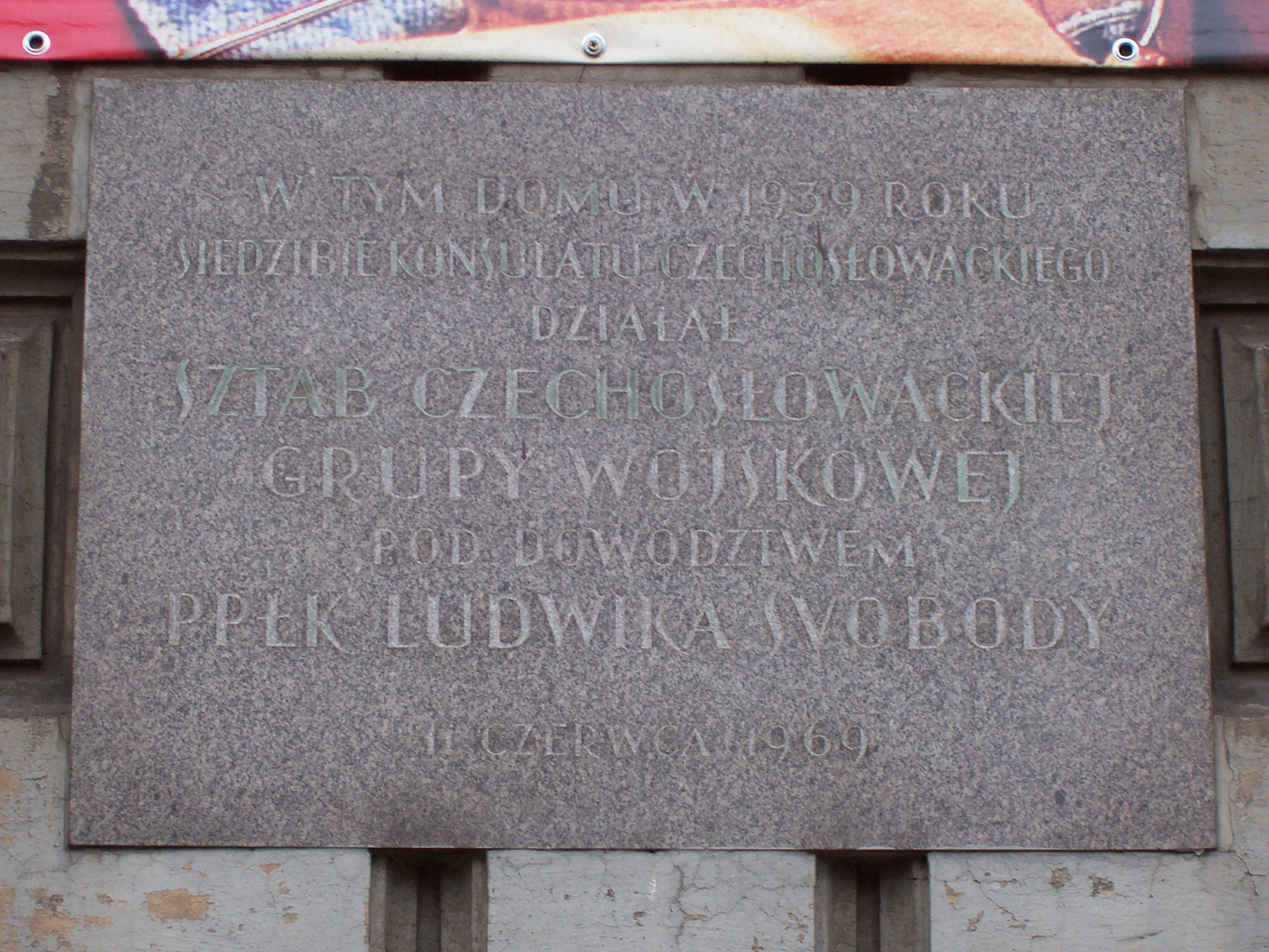 Tablica pamiątkowa na budynku dawnego konsulatu Czechosłowacji w Krakowie